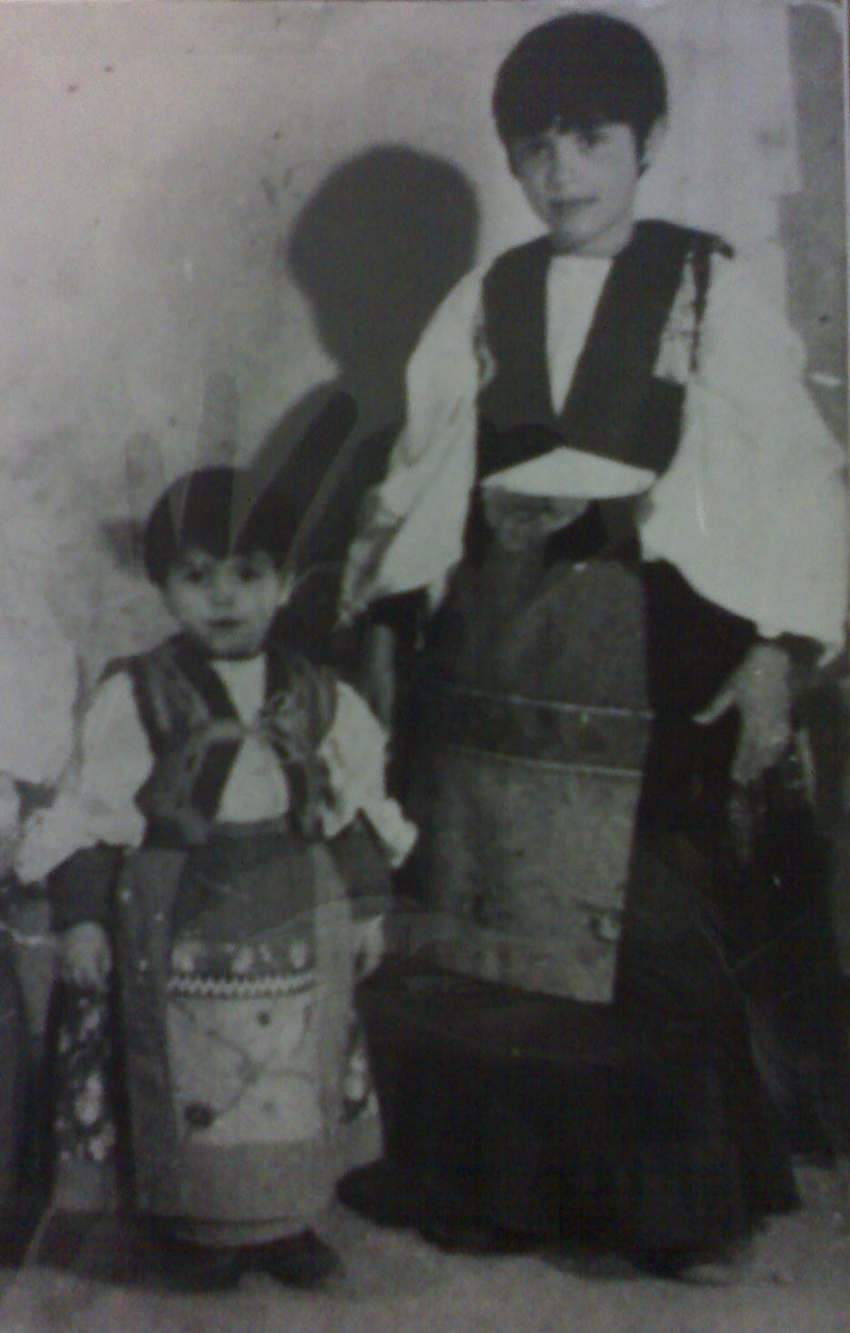 bambine in costume la più alta ha quello di Tonara, la più piccola ha un misto Desulo-Tonara